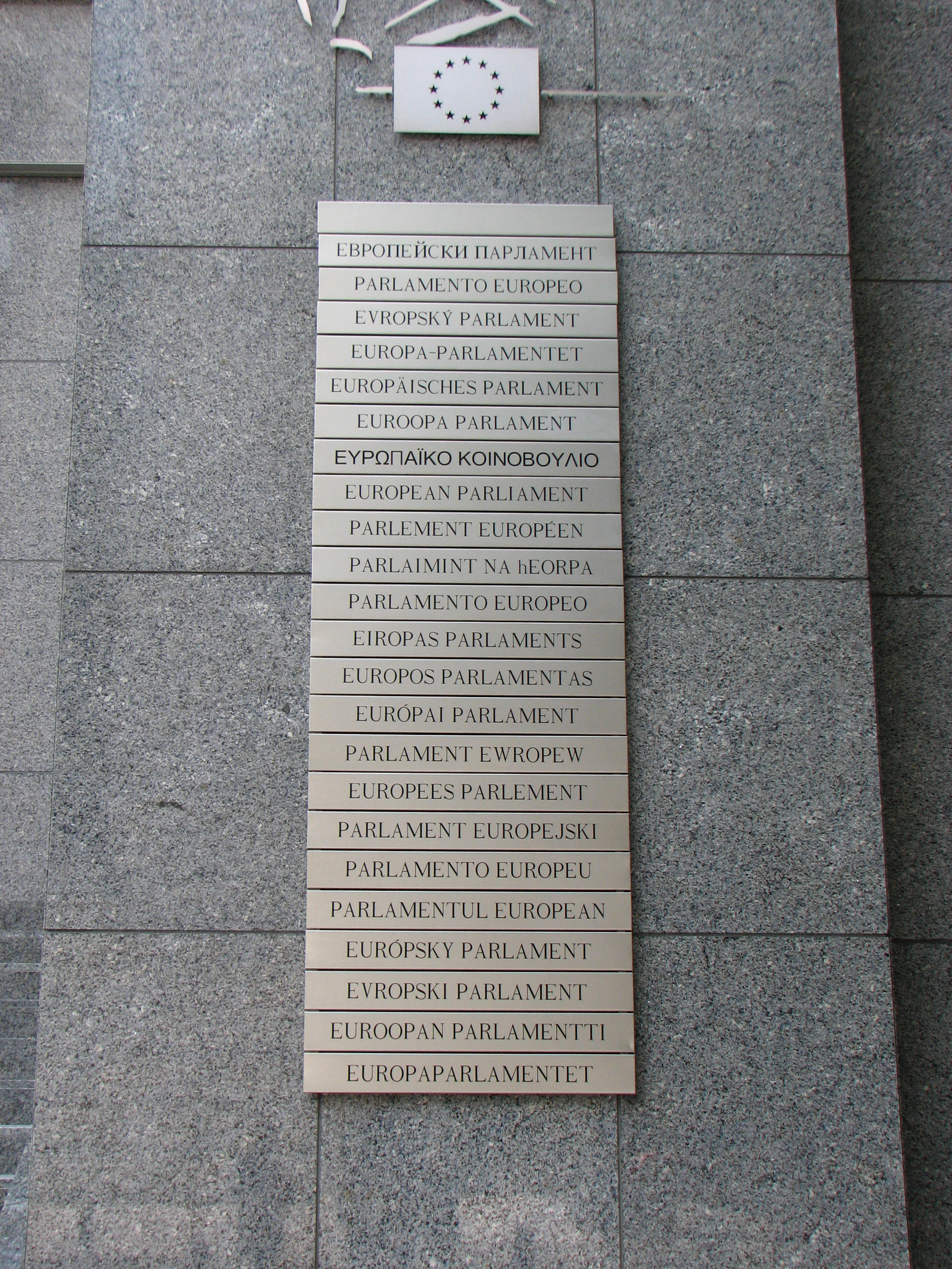 European Parliament